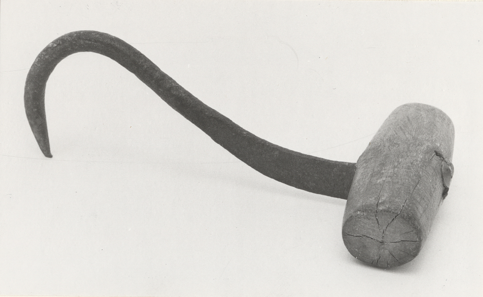 Grips - verktyg för stuveriarbetare